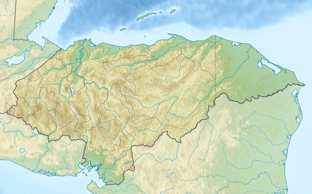 Физическая карта Гондураса Проекция — равноугольная цилиндрическая Координаты краёв карты: | top = 16.7 | bottom = 12.8 | left = -89.5 | right = -83.0